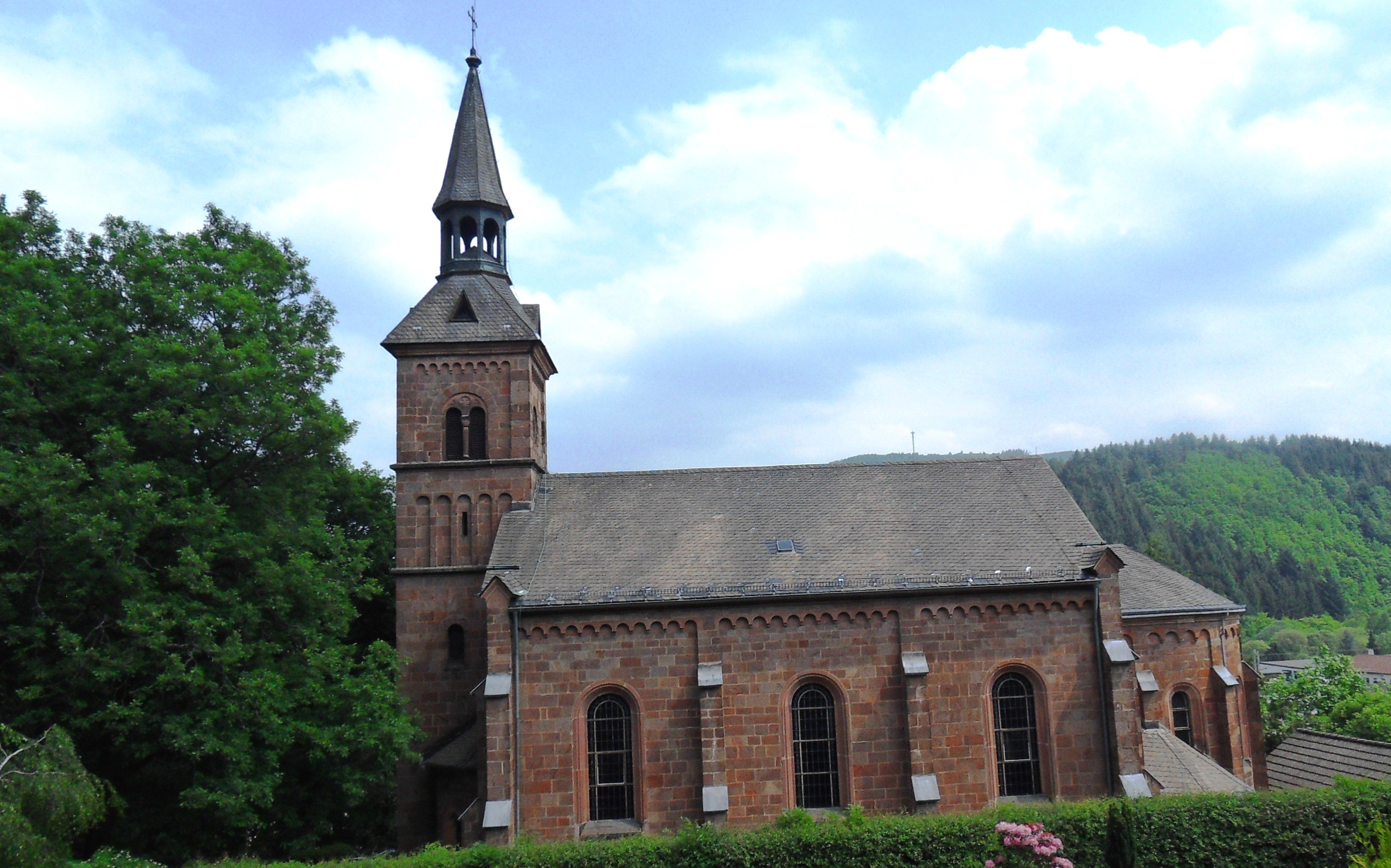 Denkmalgeschützte evangelische Kirche